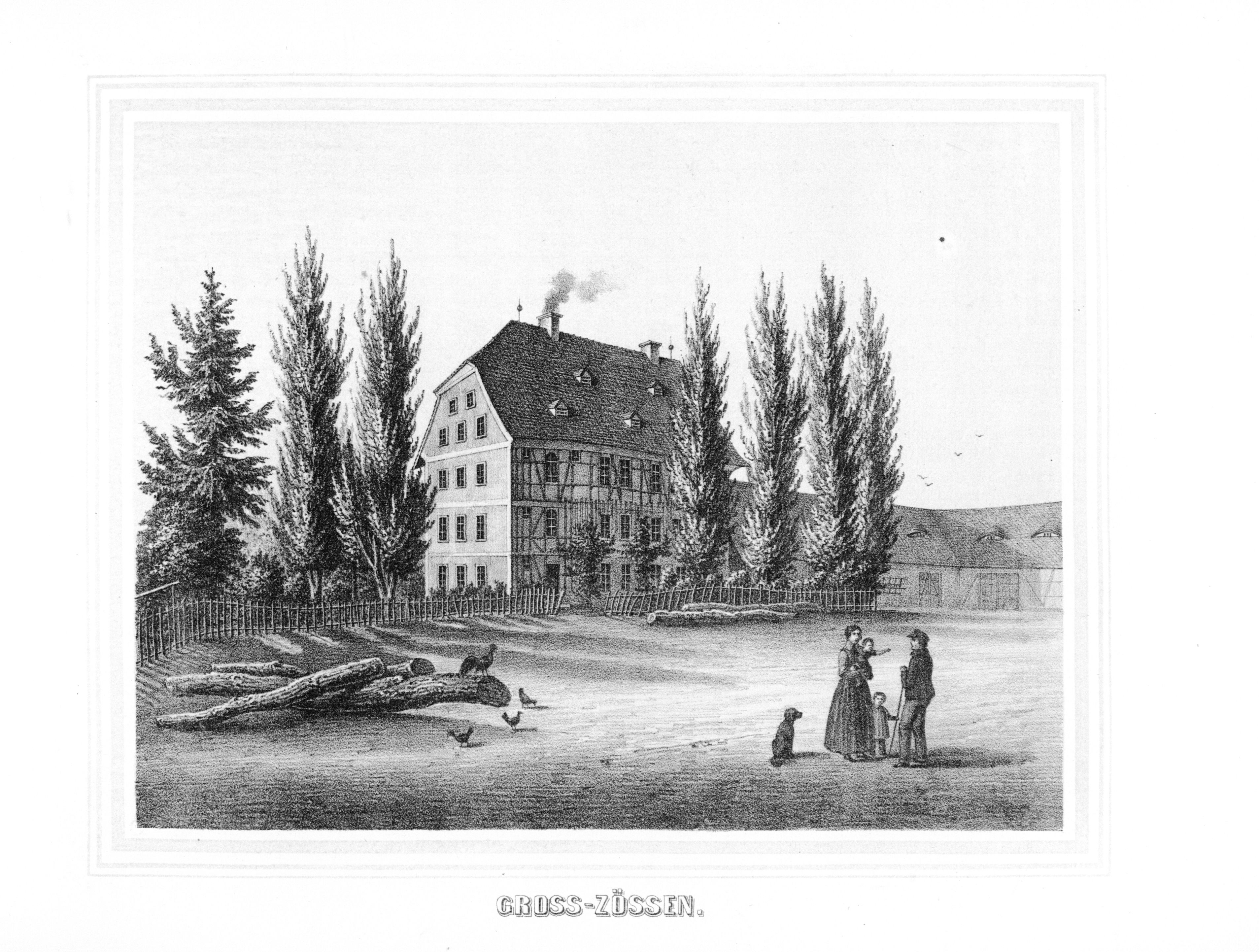 Großzössen aus: Album der Rittergüter und Schlösser im Königreiche Sachsen Leipziger Kreis Section: I